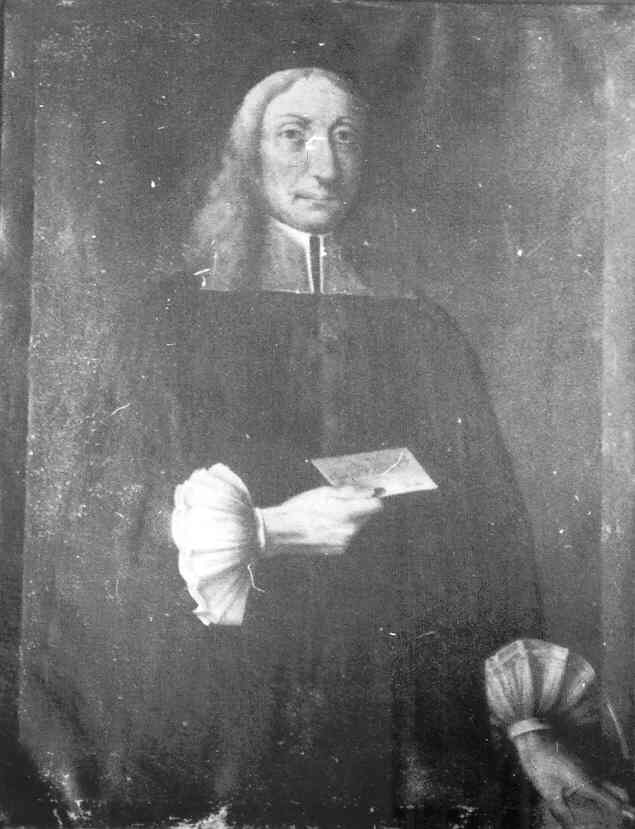 ritratto di Carlo Ambrogio Affaitati